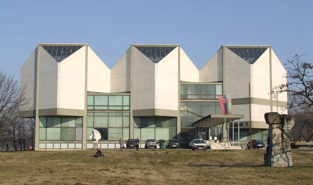 Музеј савремене уметности, јануар 2007